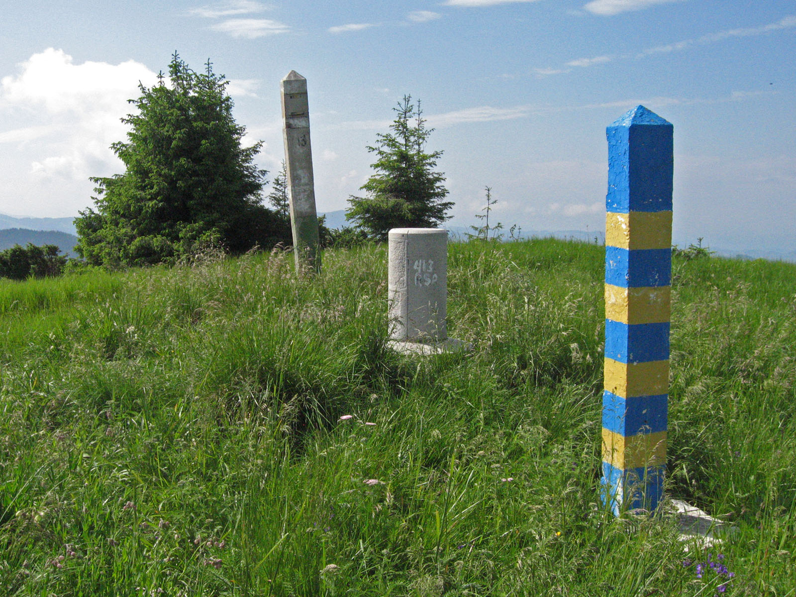 Granica rumuńsko-ukraińska, Dawny trójstyk granic polsko-czechosłowacko (węgiersko)-rumuński, tzw. "Tripleks", na górze Stóg